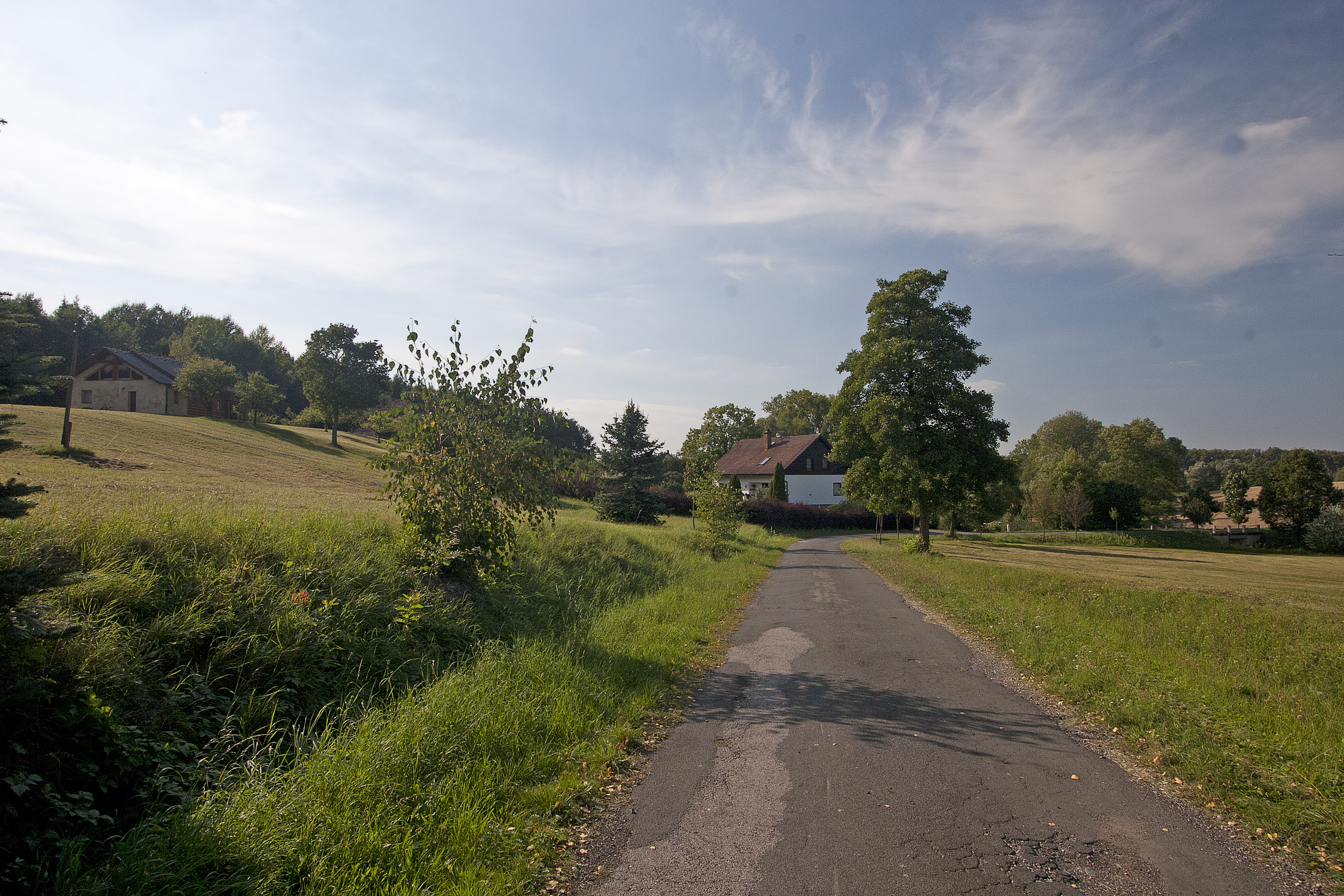 Tikov čp. 11